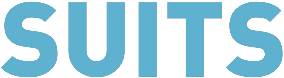 Logo der Serie Suits